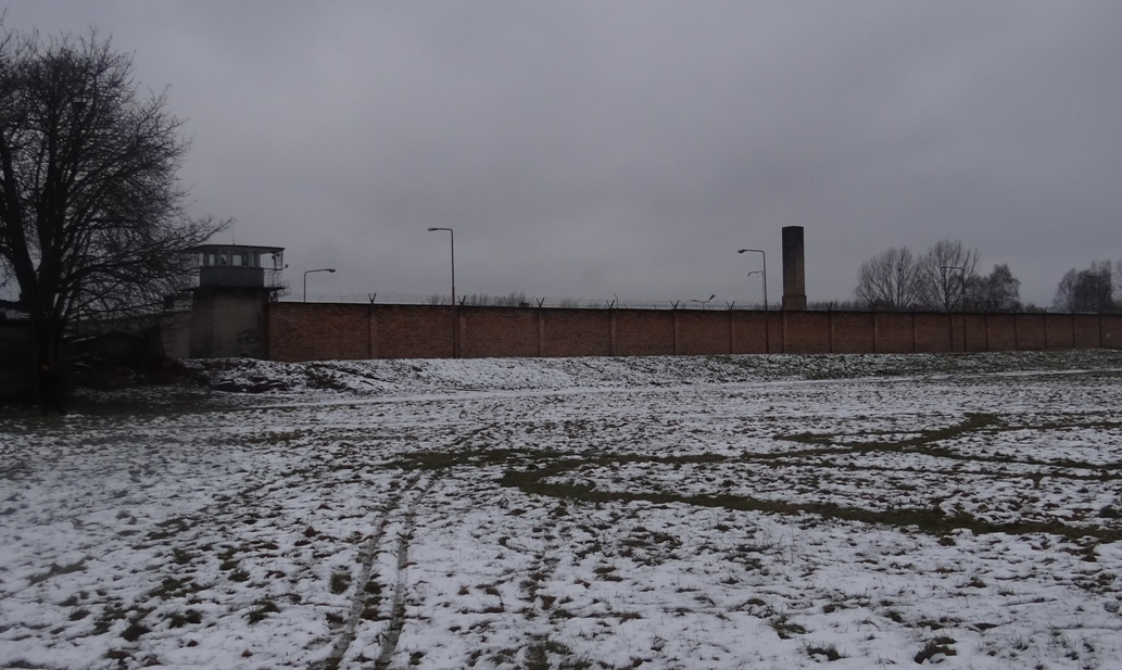 Widok wieżyczki i muru okalającego Zakład Karny Stargard.